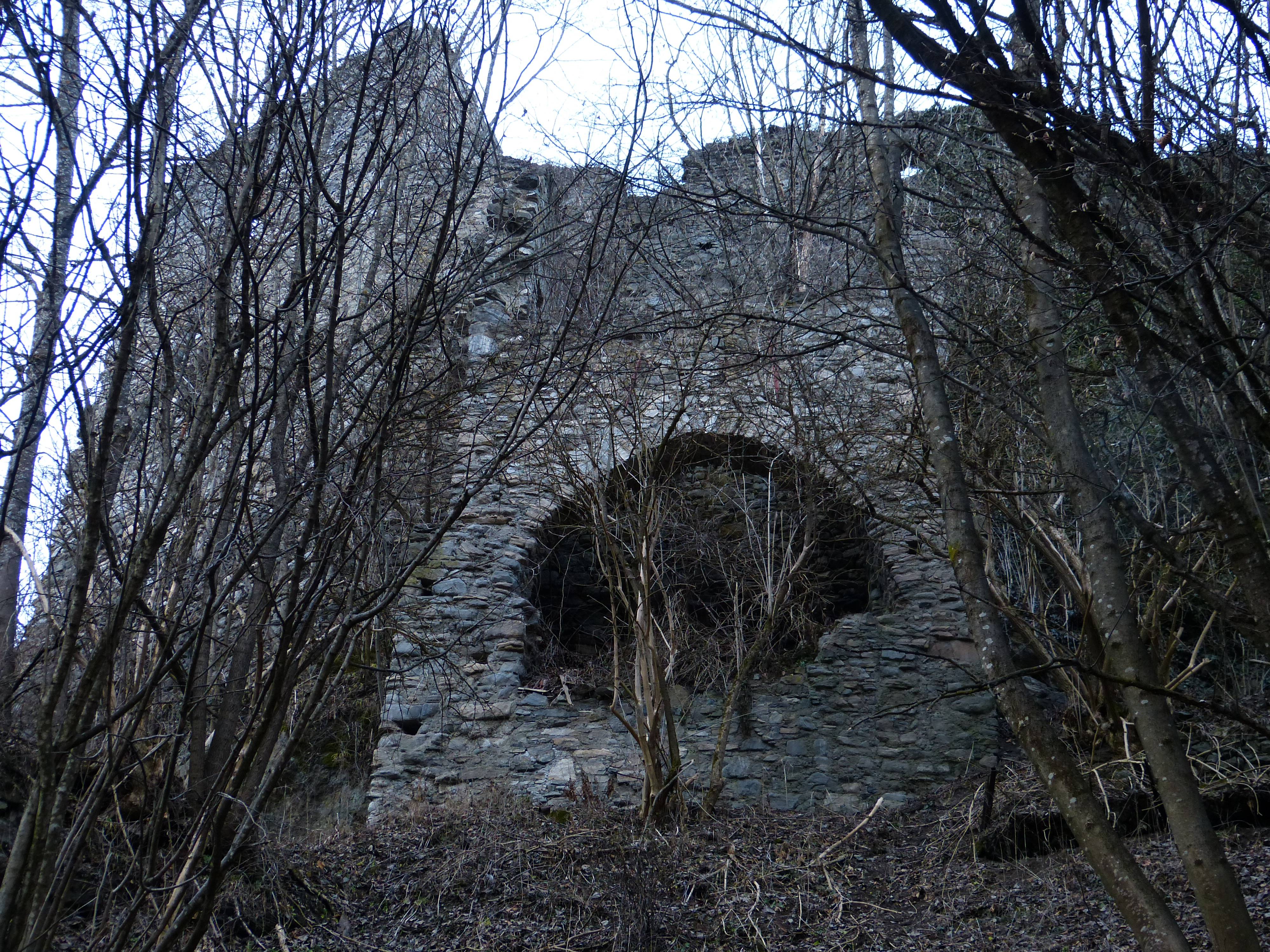 Burg Lavant: Ruinen an der Südseite